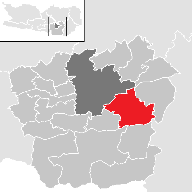 Bezirk Klagenfurt-Land